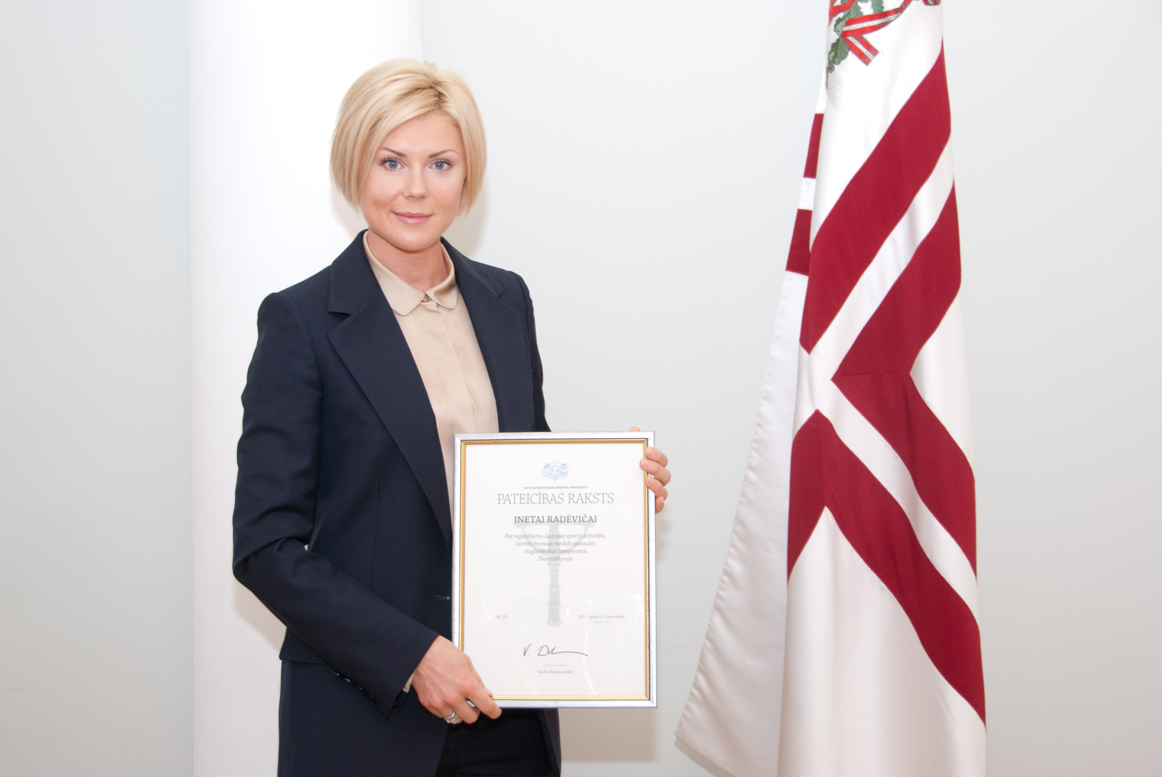 15.septembris. Ministru prezidents Valdis Dombrovskis pasniedz pateicības rakstu vieglatlētei Inetai Radēvičai. Attēlā: vieglatlēte Ineta Radēviča